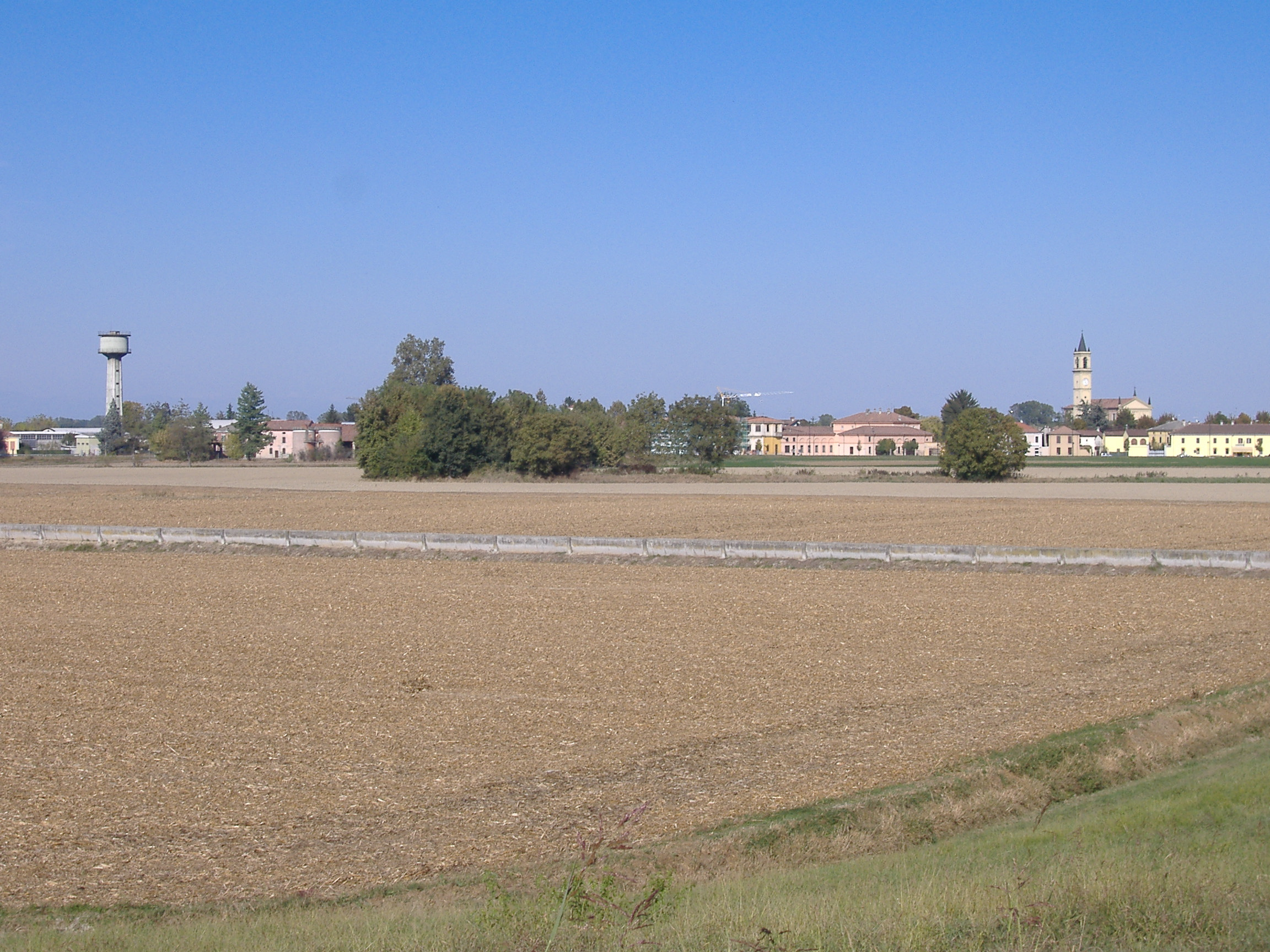 Panorama di Caselle Landi (LO) Italia